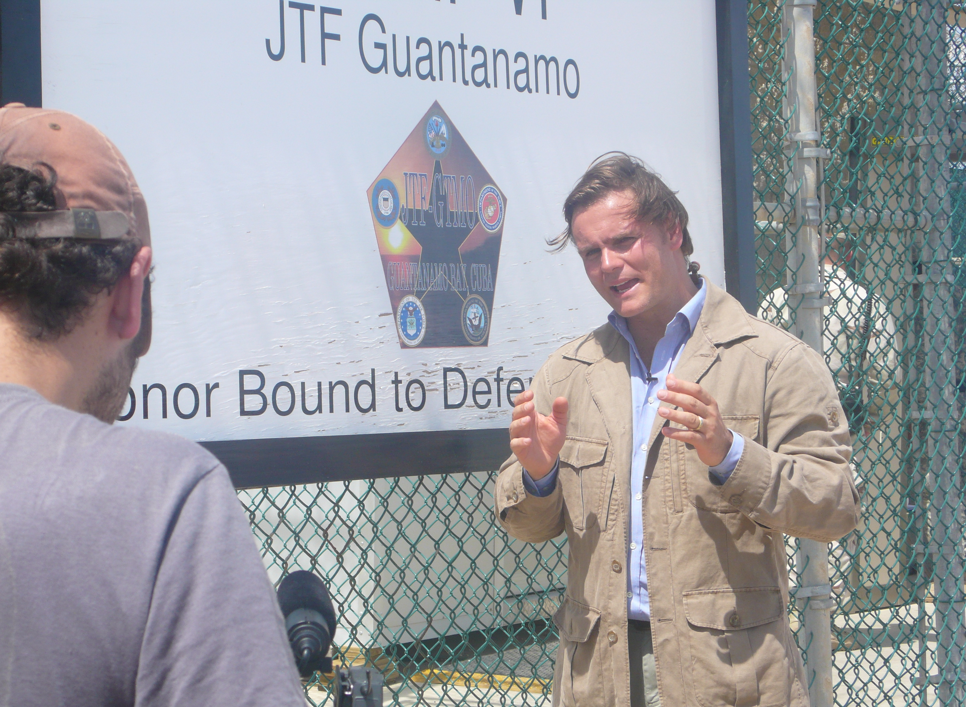 Premio Rey de España de Periodismo